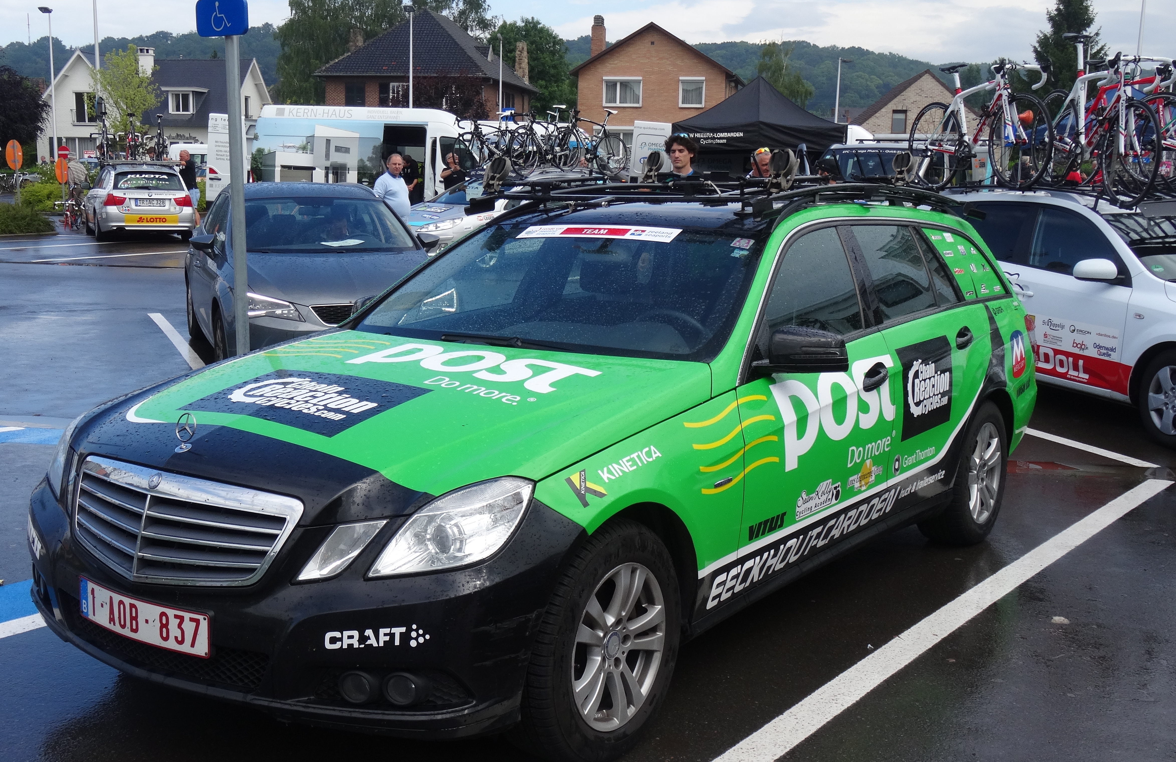 Reportage photographique réalisé le dimanche 8 juin à l'occasion du départ du Mémorial Philippe Van Coningsloo 2014 à Wavre, Belgique.